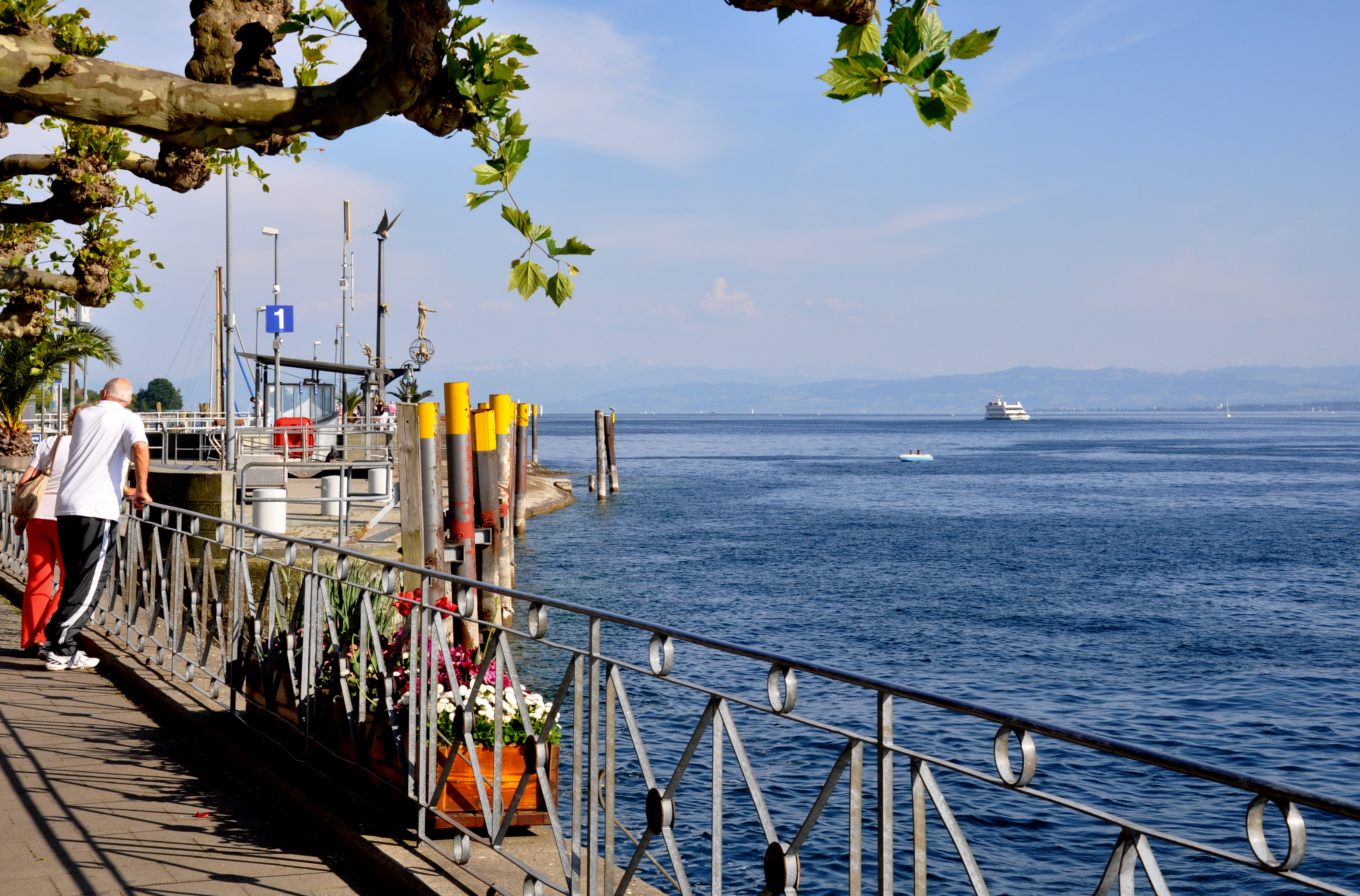 Meersburg, Seepromenade, im Hintergrund Skulptur "Magische Säule" von Peter Lenk